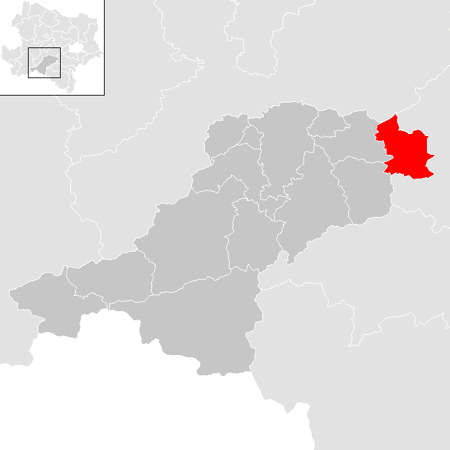 Bezirk Lilienfeld